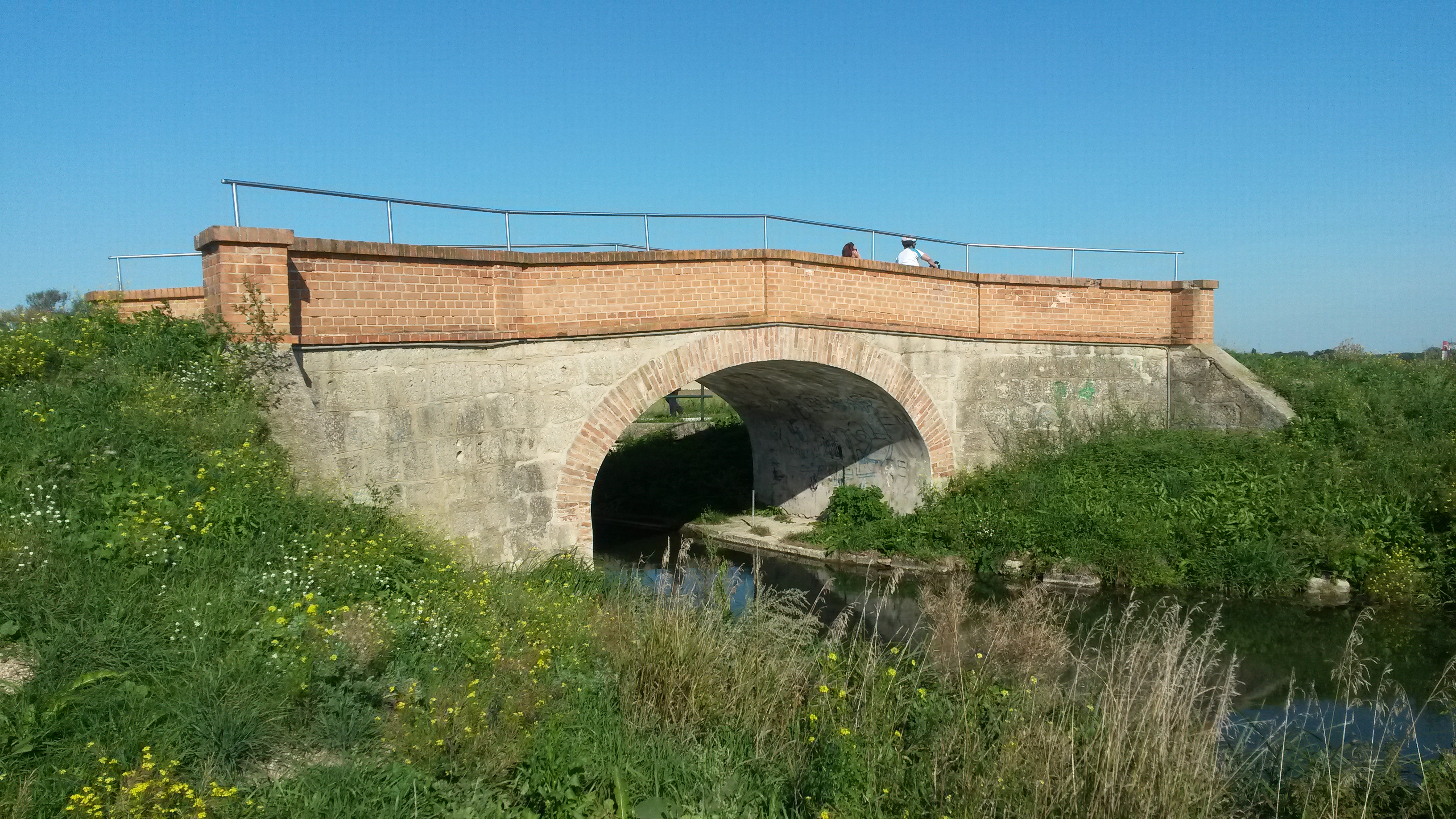 Schaffler-Brücke (erbaut um 1800, renoviert 1990) über den Wiener Neustädter Kanal bei Lichtenwörth/Österreich.